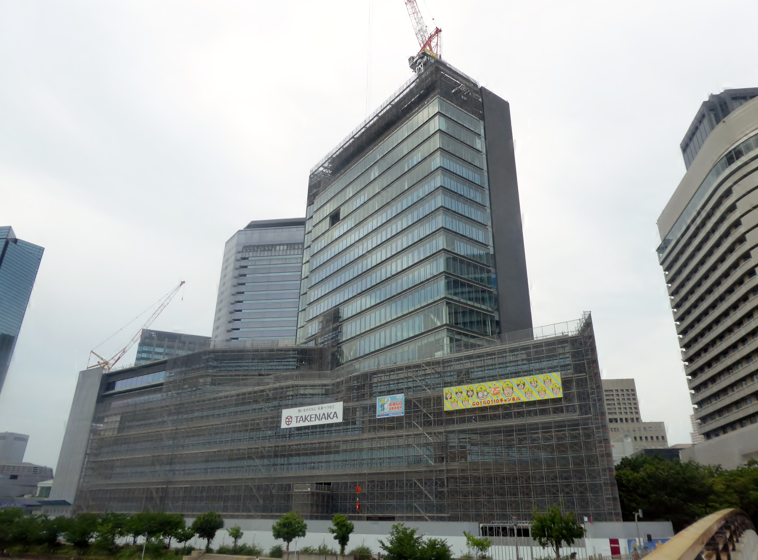 2018年6月27日時点の3代目讀賣テレビ放送株式会社本社を撮影。